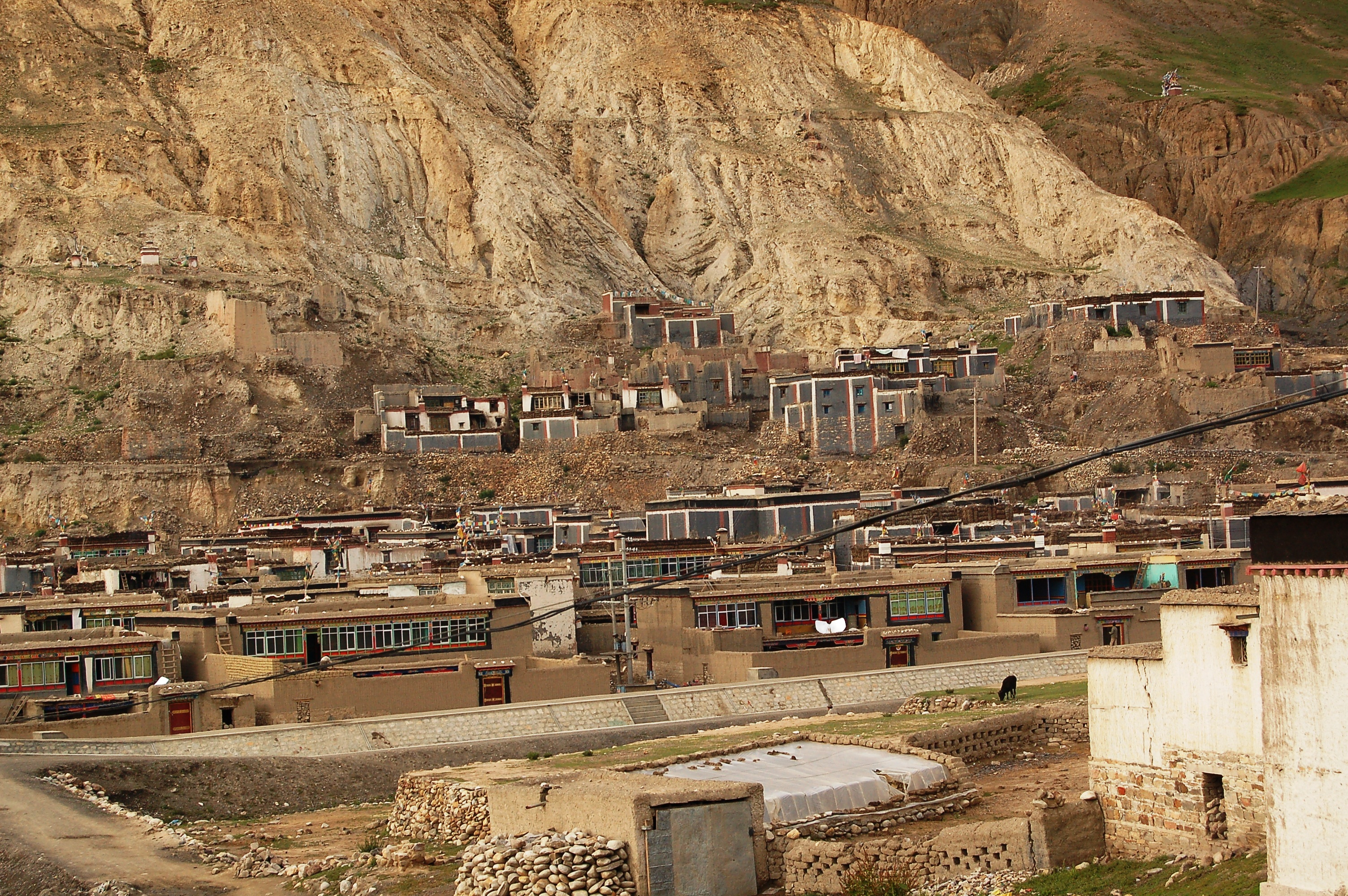 Sakya, Reste des völlig zerstörten Nordklosters mit einigen Neubauten